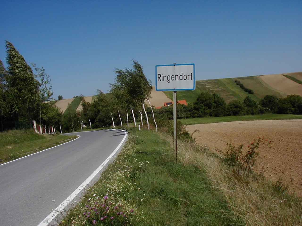 Ortstafel von Ringendorf (Gemeinde Großmugl)